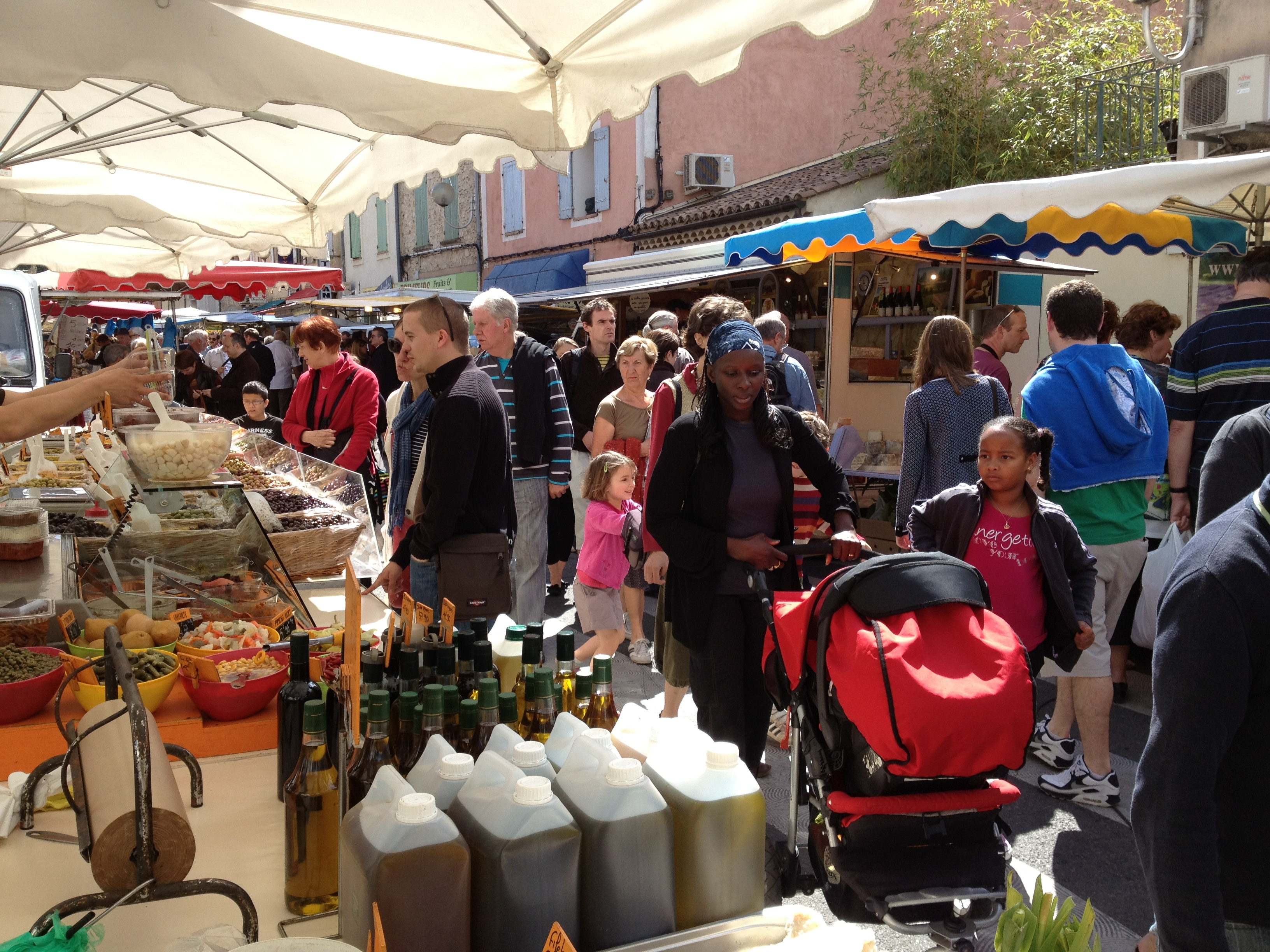 Stands du marché de Malaucène